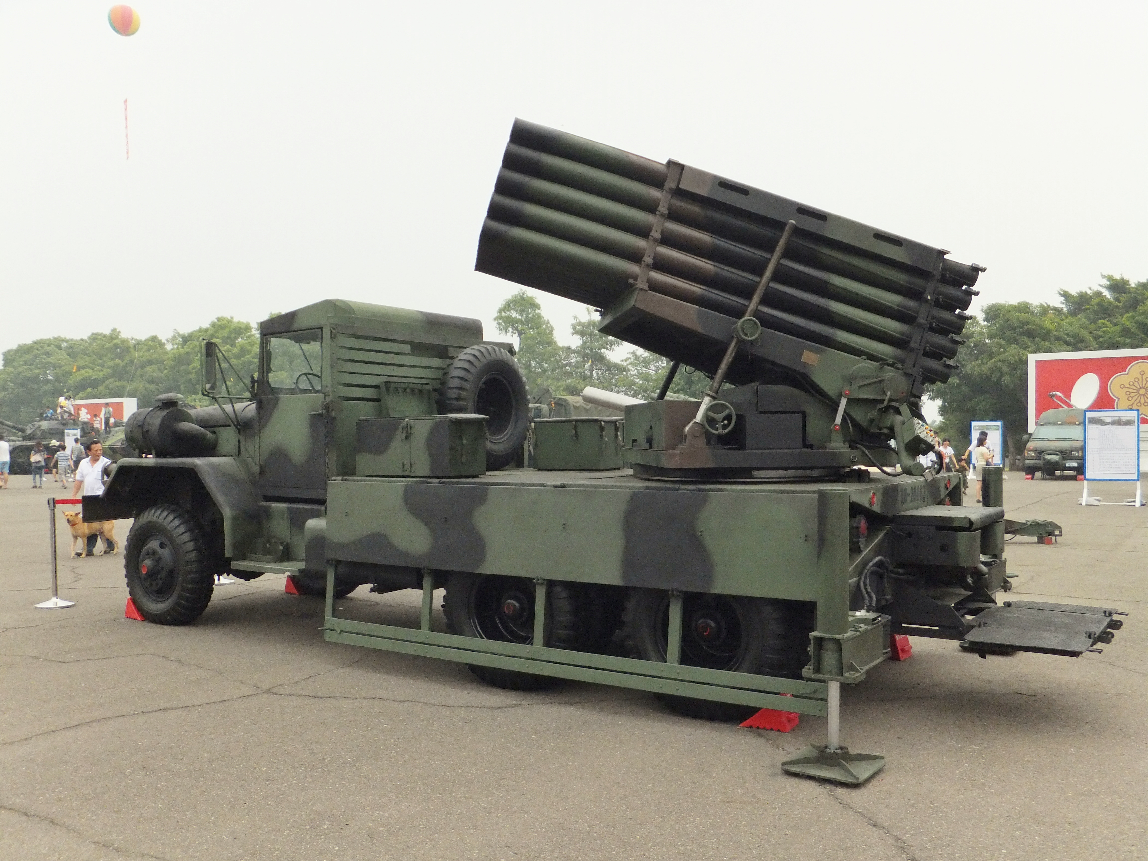 左斜後方所見工蜂六型多管火箭系統，攝於2011年成功嶺營區開放活動。